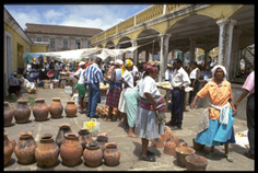 Mercado da Assomada. Santa Catarina. Junho de 1997.